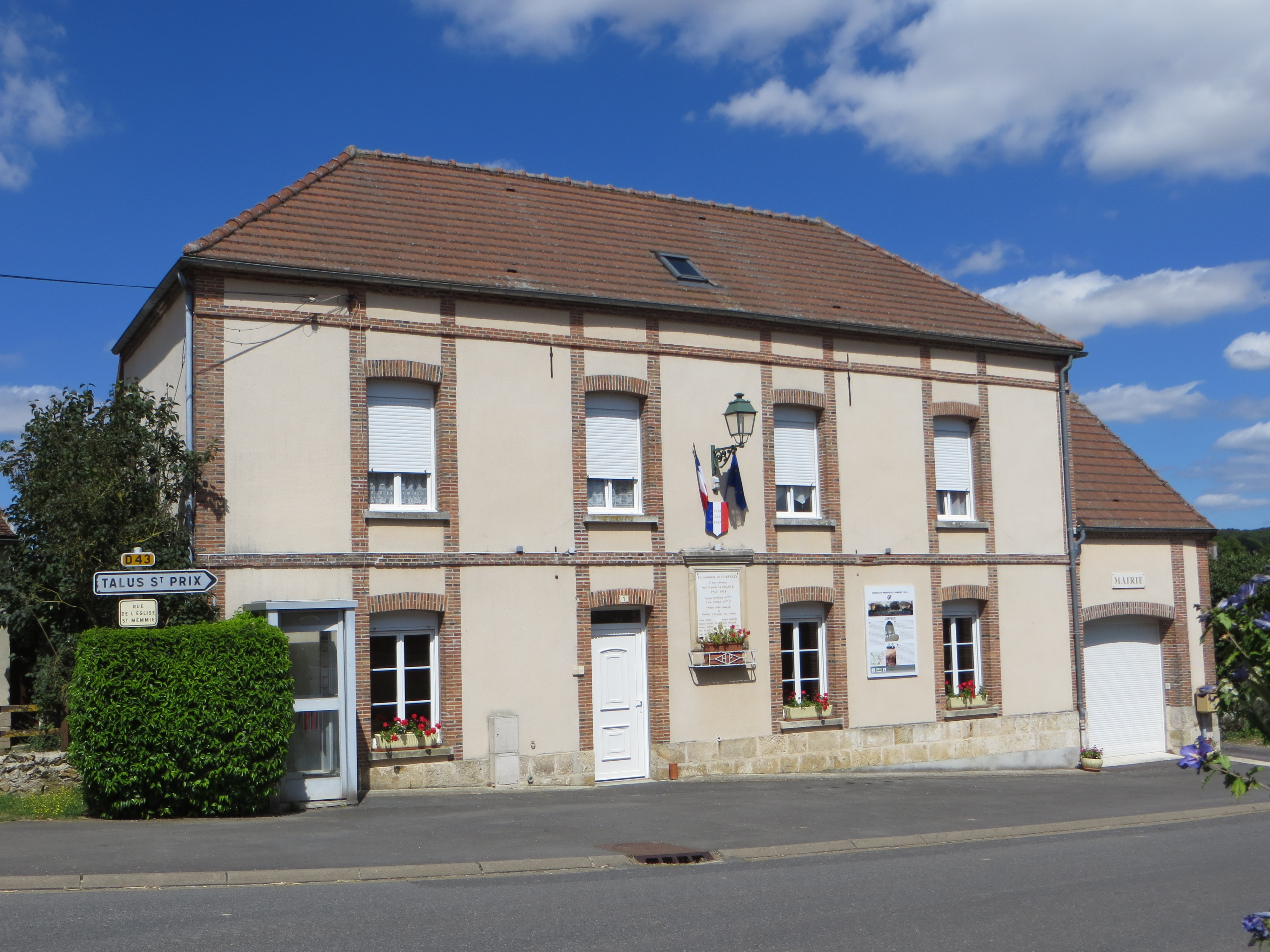 Mairie du village